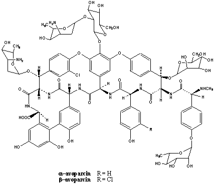 Avoparcin molecule